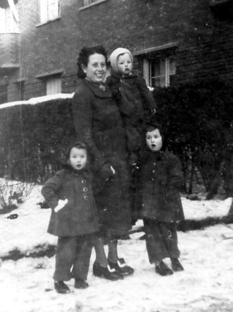 Germaine Hénaff , place Séverine au Pré Saint Gervais (93) en hiver 1940. Eugène Hénaff était en clandestinité, puis prisonnier successivement à Aincourt, à Fontevrault, puis à Clairvaux.